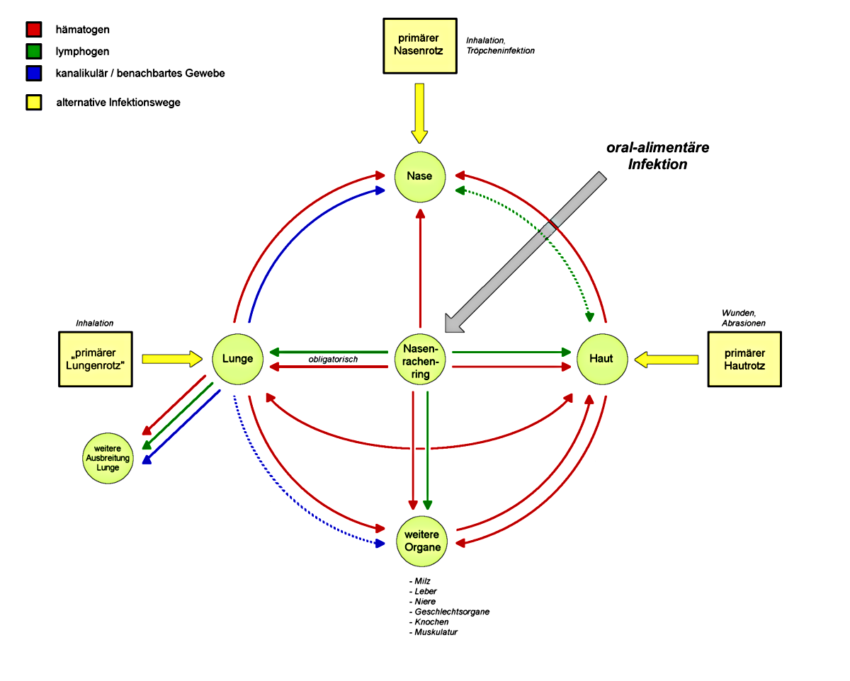 Infektionsschema "Rotz"